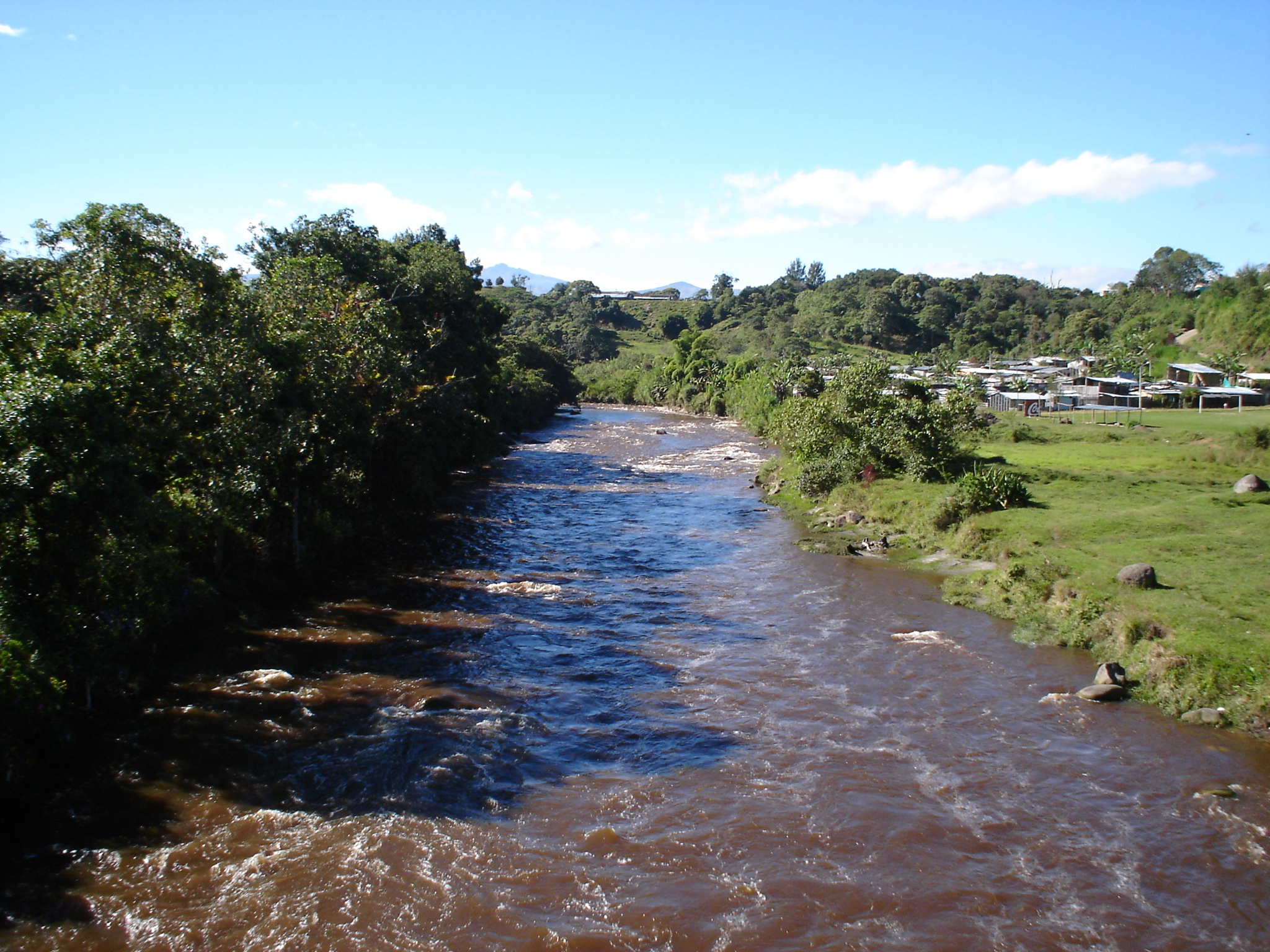 Rio Cauca Cerca de Popayán, Colombia